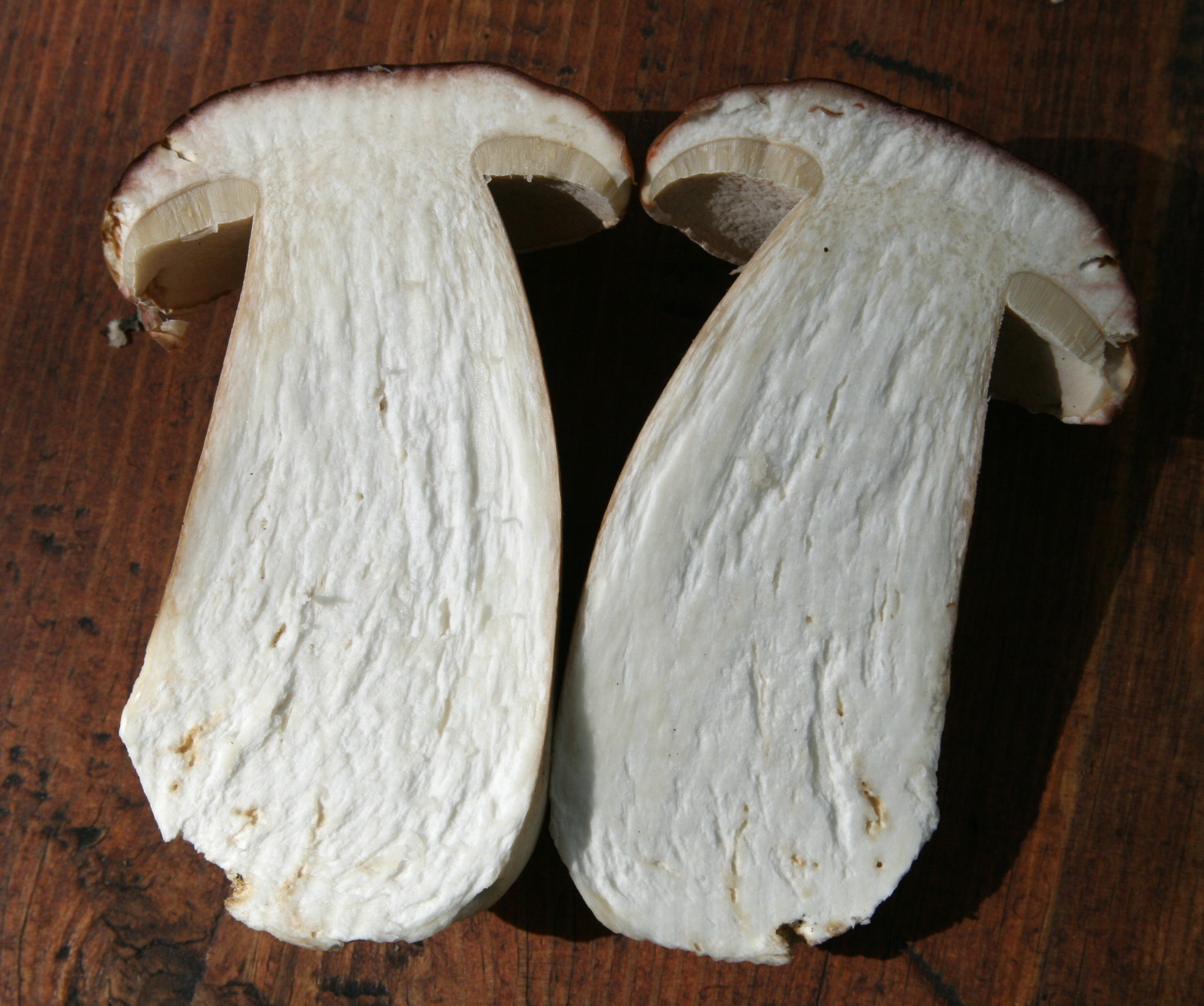 Herkkutatti, Boletus edulis, halkaistuna